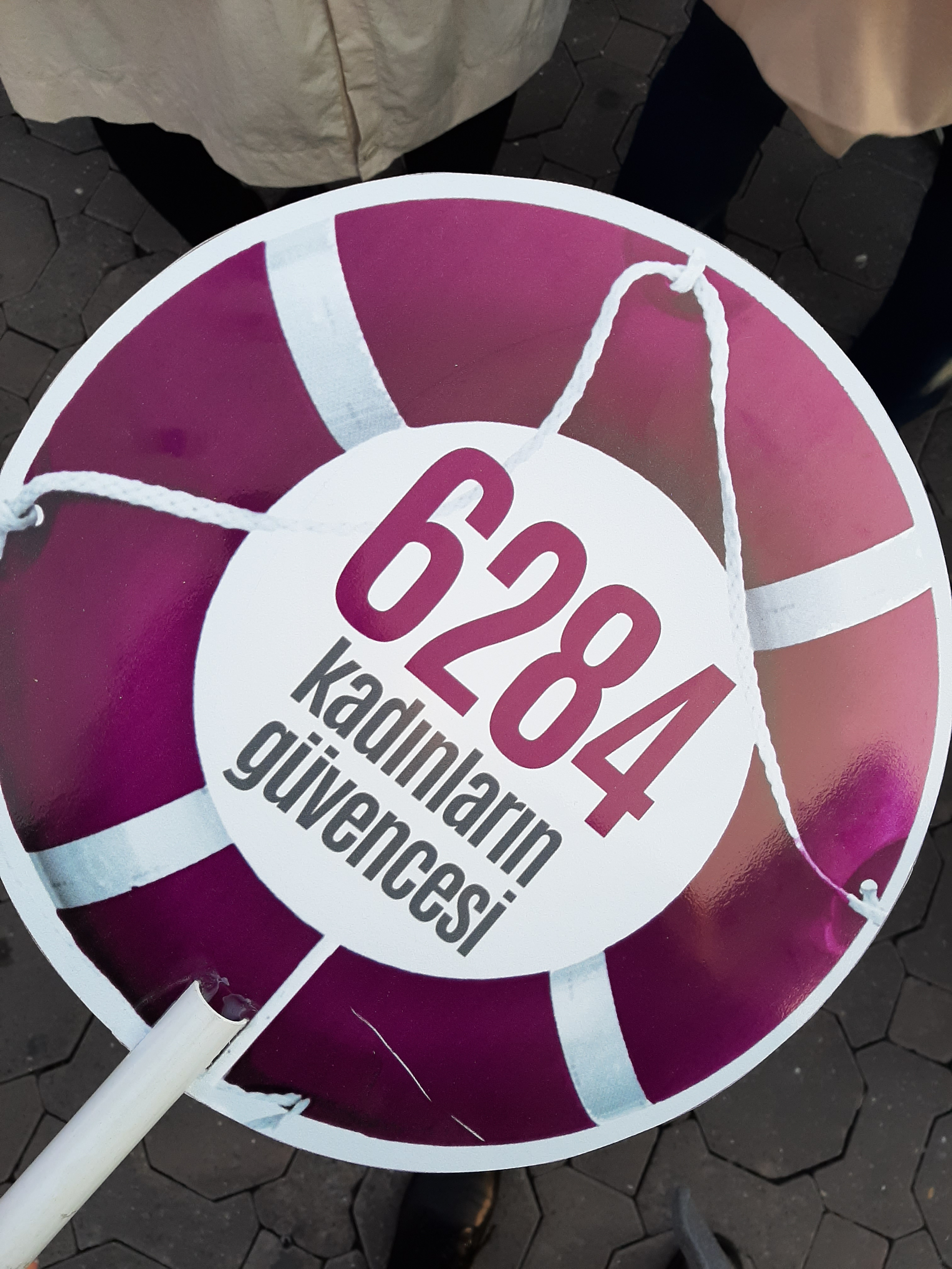 Kadin meclislerinin 6284 sayili yasayi yayginlastirmak icin tasarladigi lolipop